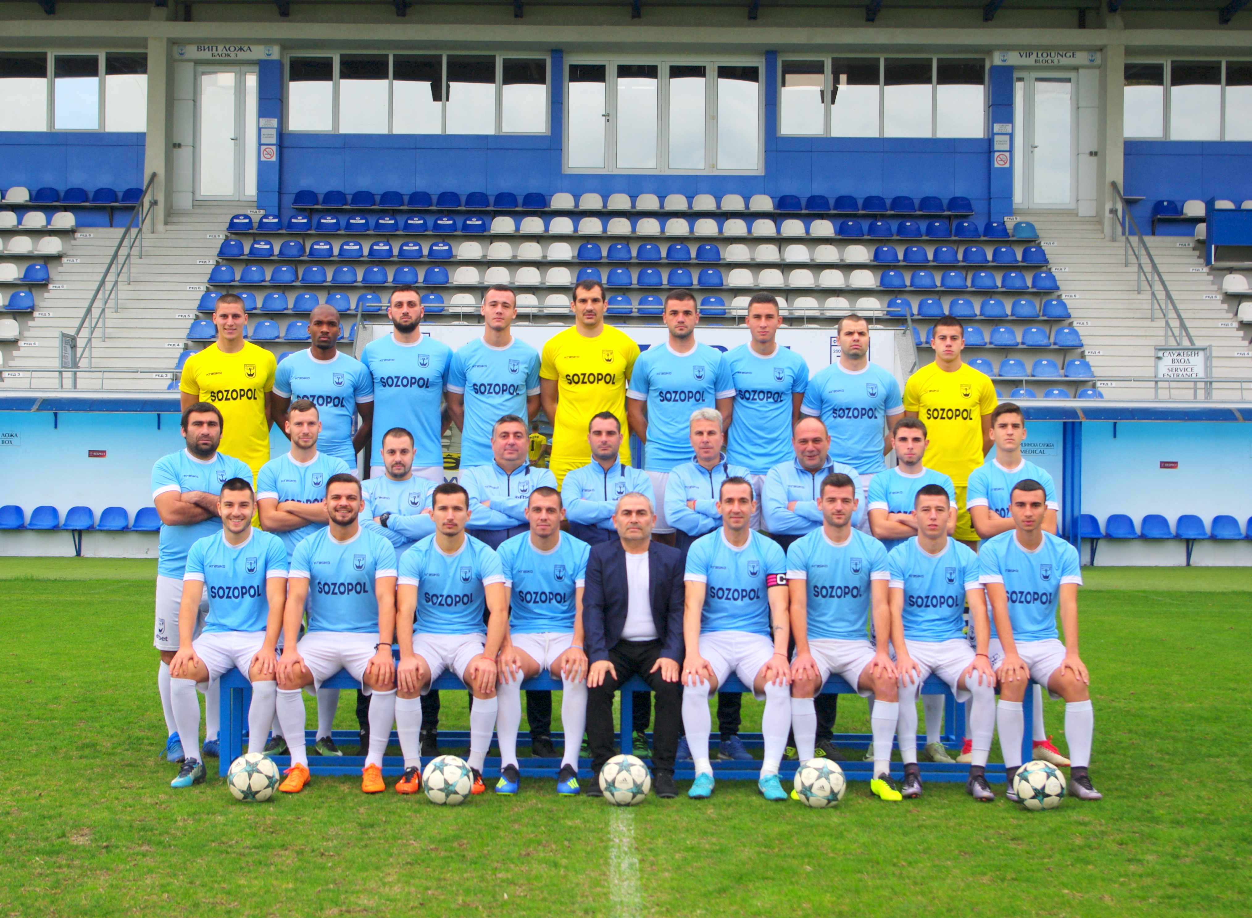 Созопол сезон 2018-2019